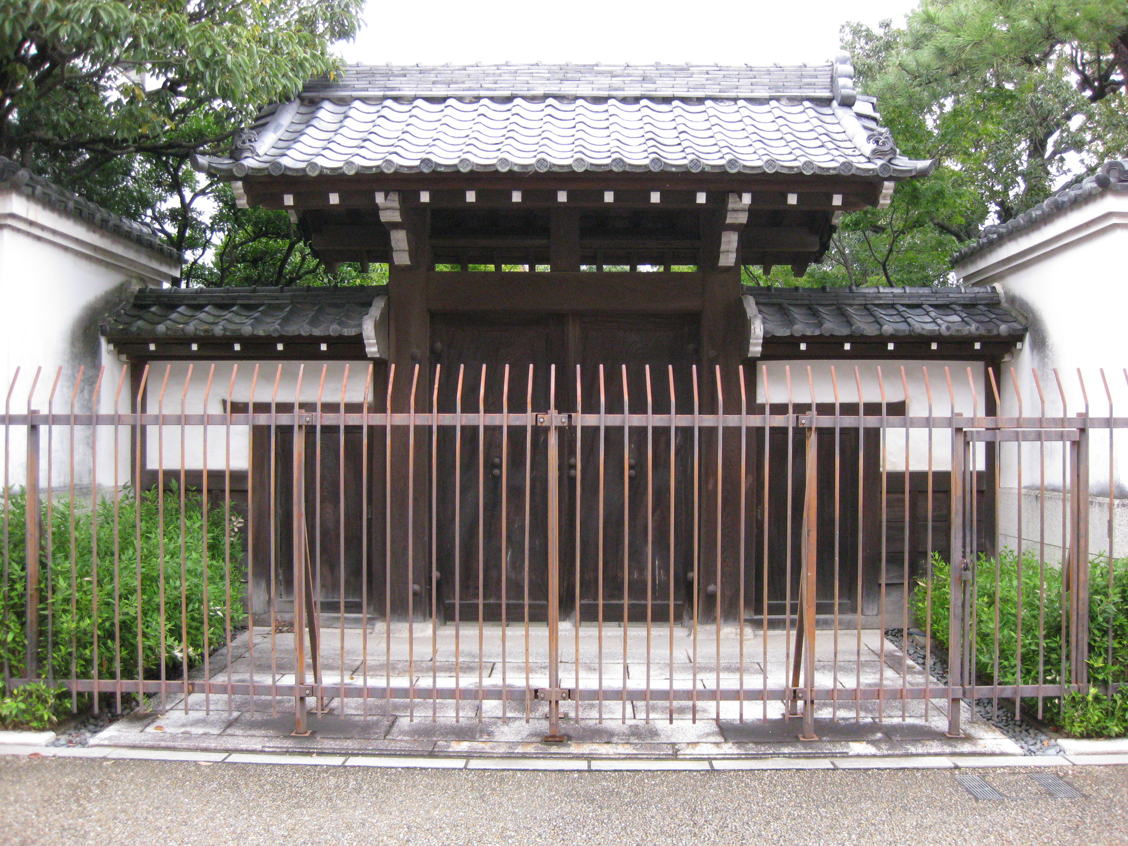 三井家発祥の地